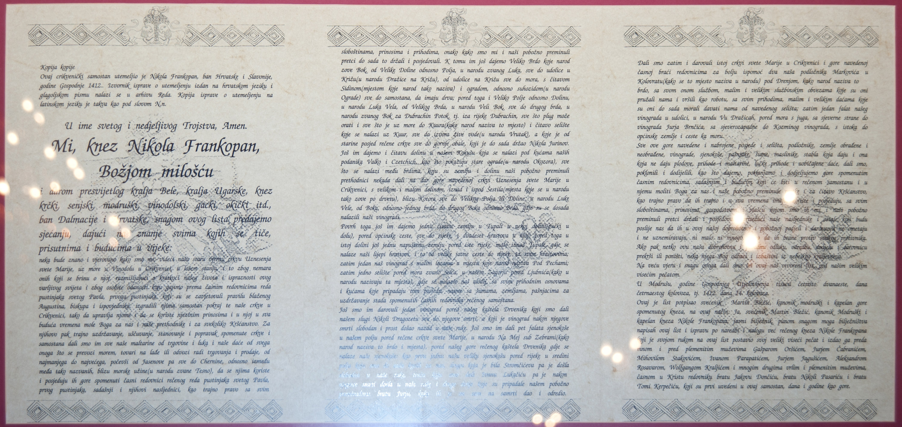 Nikola IV. Frankapan